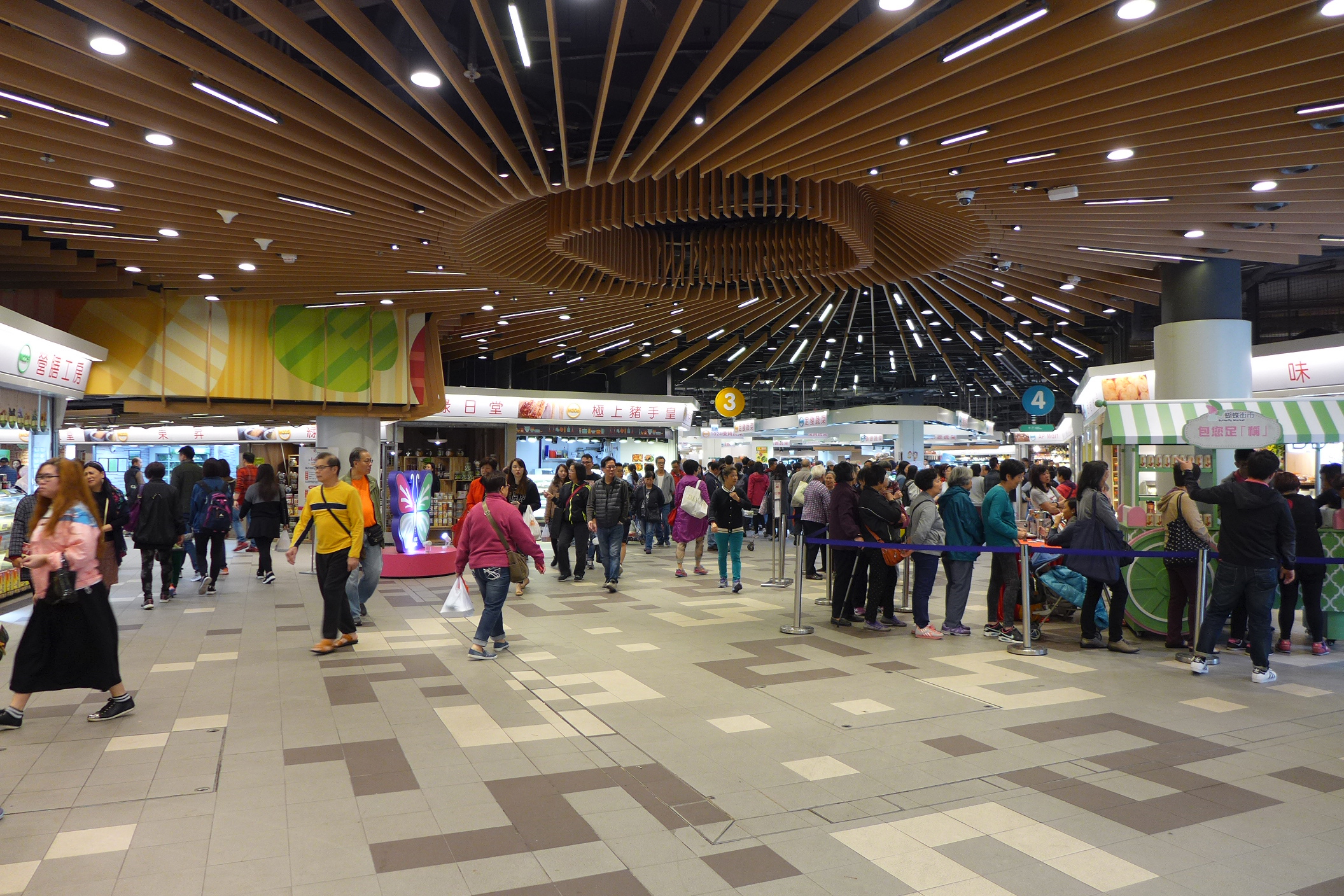 Butterfly Market